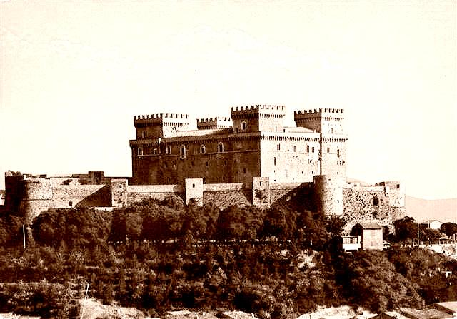 Castello Piccolomini di Celano (brunito)